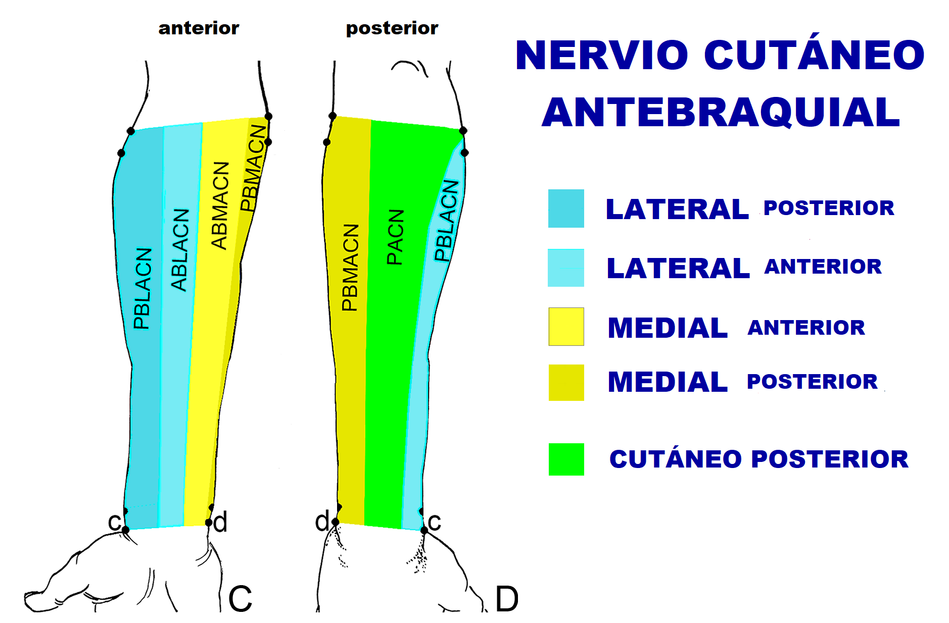 Figura 4. Patrón de distribución y área de inervación del nervio cutáneo del antebrazo. (C) Área inervada por nervios cutáneos del antebrazo anterior. (D) Área inervada por nervios cutáneos del antebrazo posterior.